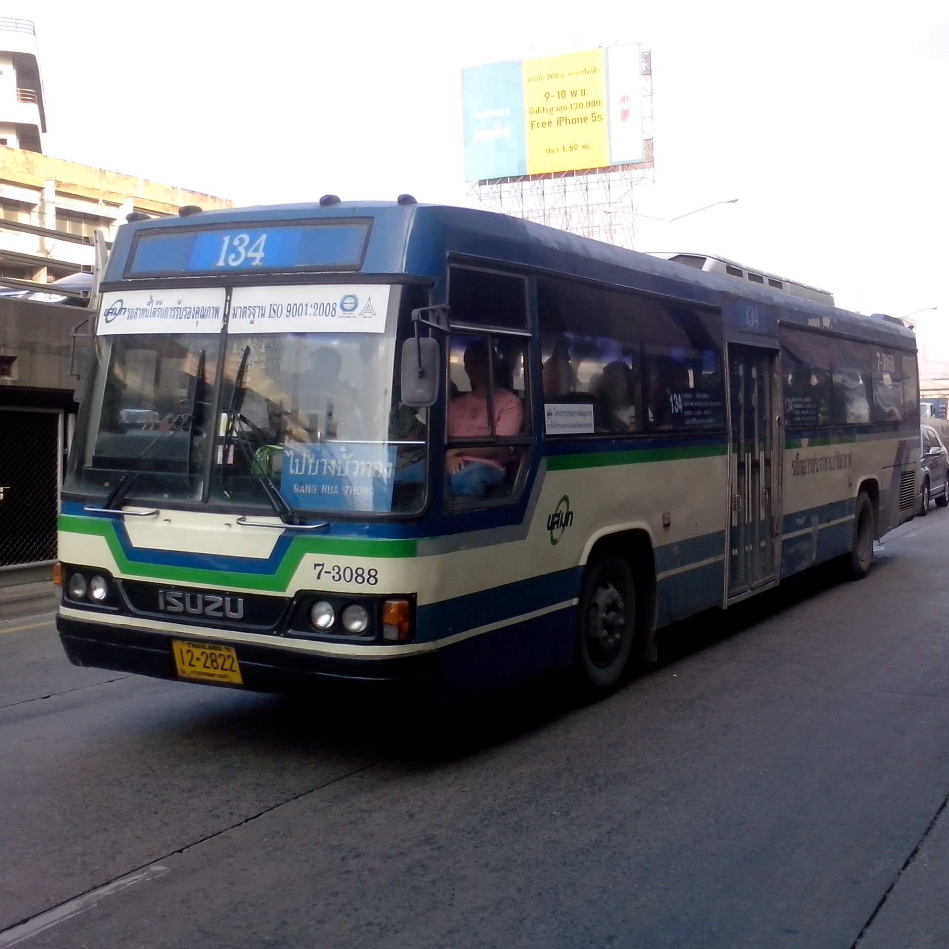 bus no.7-3088